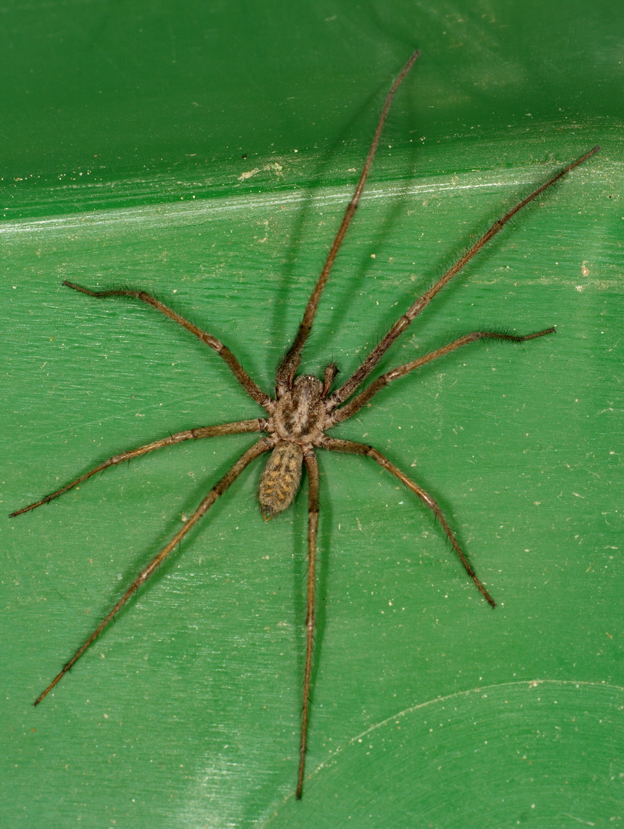 Eine Große Winkelspinne